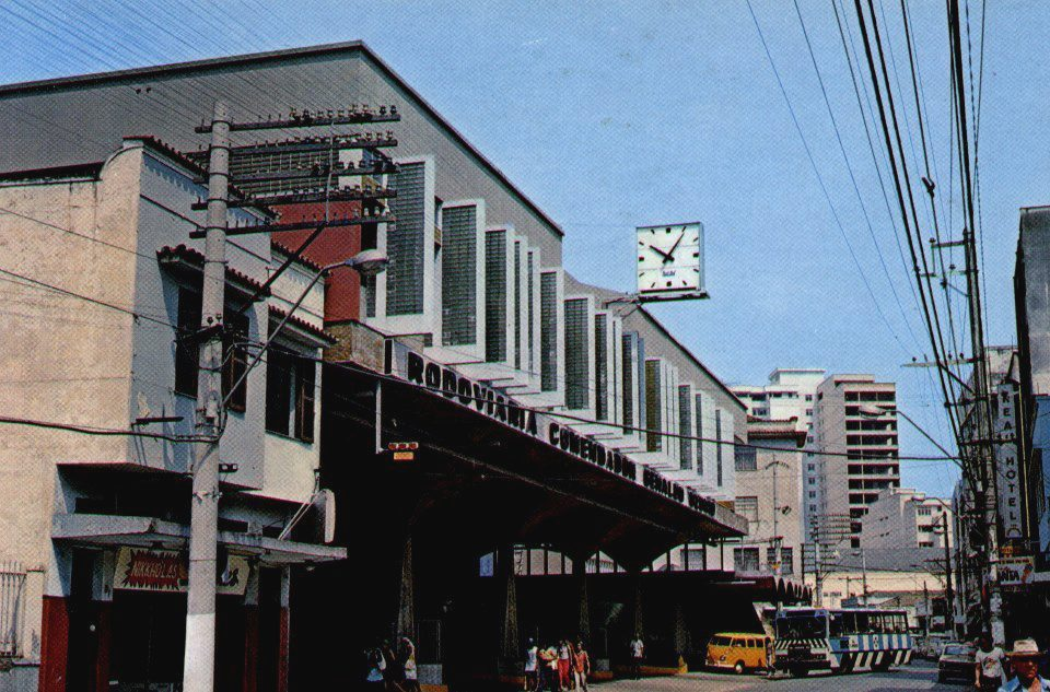 Rodoviária no centro de Barra Mansa, na metade dos anos 70.